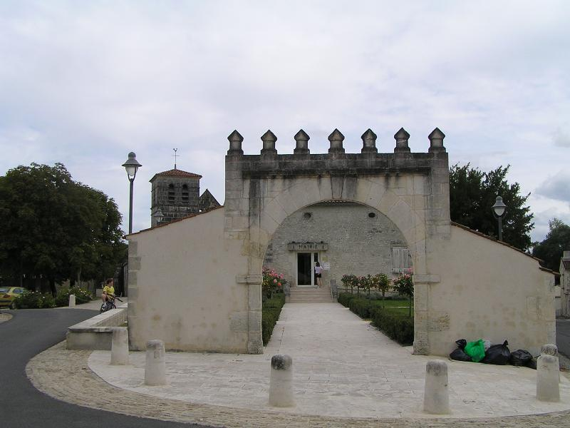 mairie d'Ars